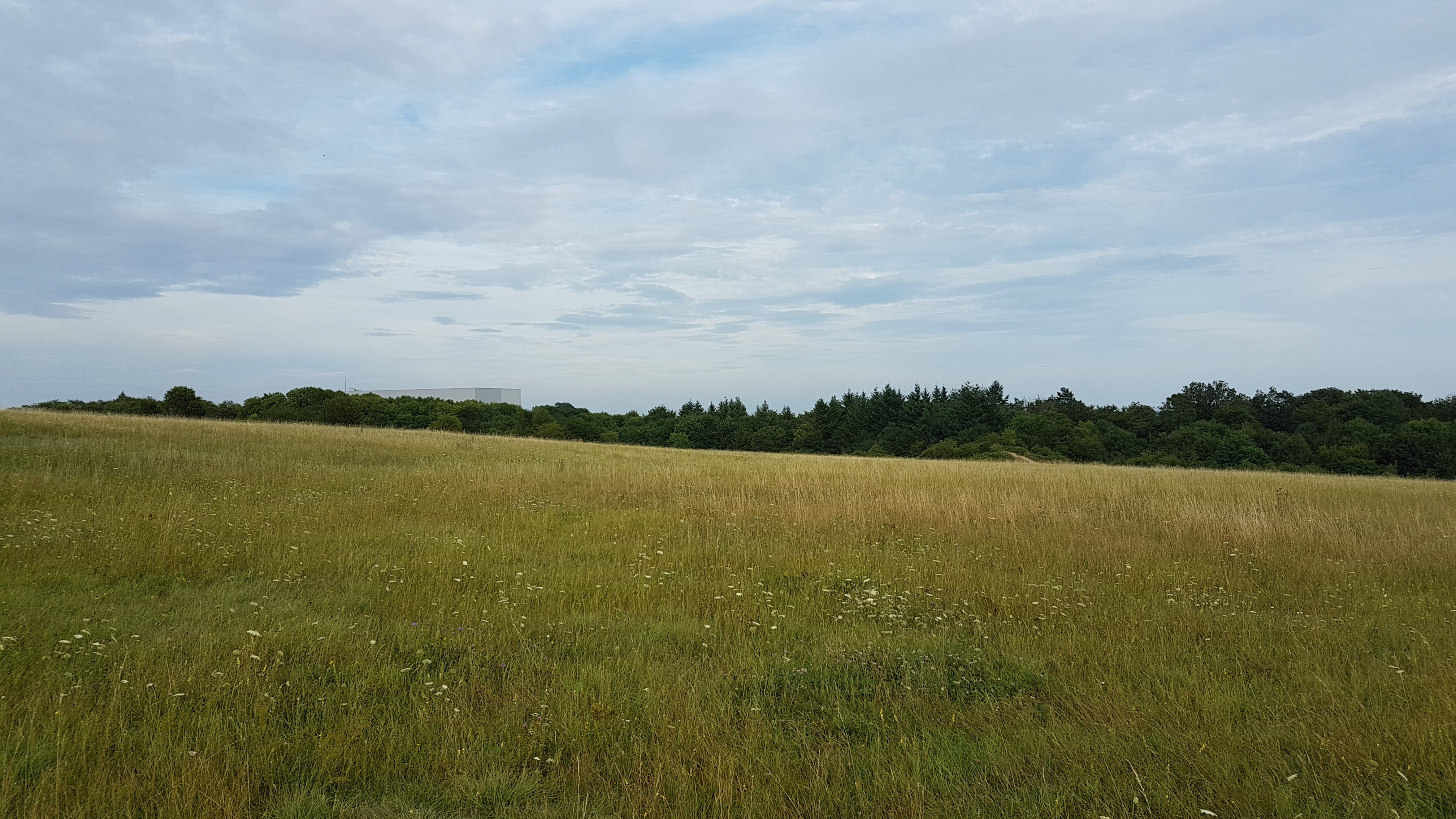 Truppenübungsplatz der ehemaligen Deutschorden-Kaserne auf dem Drillberg in Bad Mergentheim. Heute Firmensitz von Würth Industrie Service.